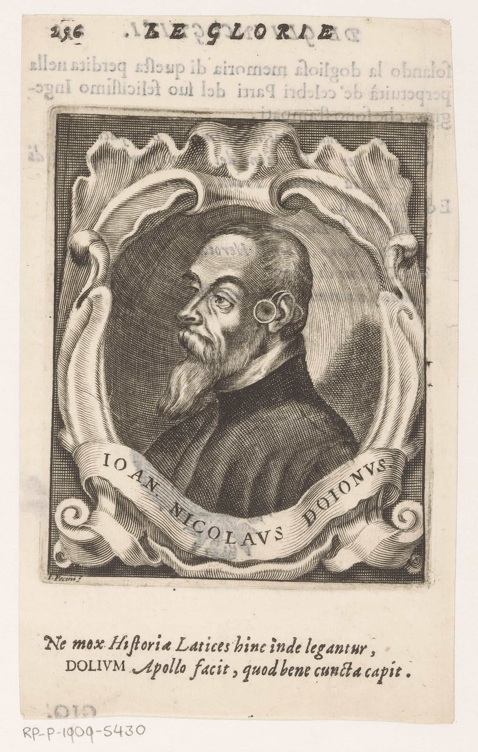 IdentificatieTitel(s): Portret van wiskundige Giovanni Nicolò DoglioniObjecttype: prent boekillustratie Objectnummer: RP-P-1909-5430Opschriften / Merken: verzamelaarsmerk, verso, gestempeld: Lugt 2228VervaardigingVervaardiger: prentmaker: Giacomo Piccini (vermeld op object)uitgever: Francesco ValvasensePlaats vervaardiging: VenetiëDatering: 1647Fysieke kenmerken: gravure; tekst in boekdruk op recto en versoMateriaal: papier Techniek: graveren (drukprocedé) / boekdrukAfmetingen: plaatrand: h 123 mm × b 102 mmblad: h 182 mm × b 114 mmToelichtingPrent uit de publicatie: Loredan, Giovan Francesco. Le glorie degli Incogniti. Venetië: Francesco Valvasense, 1647, p. 256.OnderwerpWat: historical personseyeglasses, spectaclesWie: Giovanni Nicolò DoglioniVerwerving en rechtenVerwerving: aankoop 1905Copyright: Publiek domein